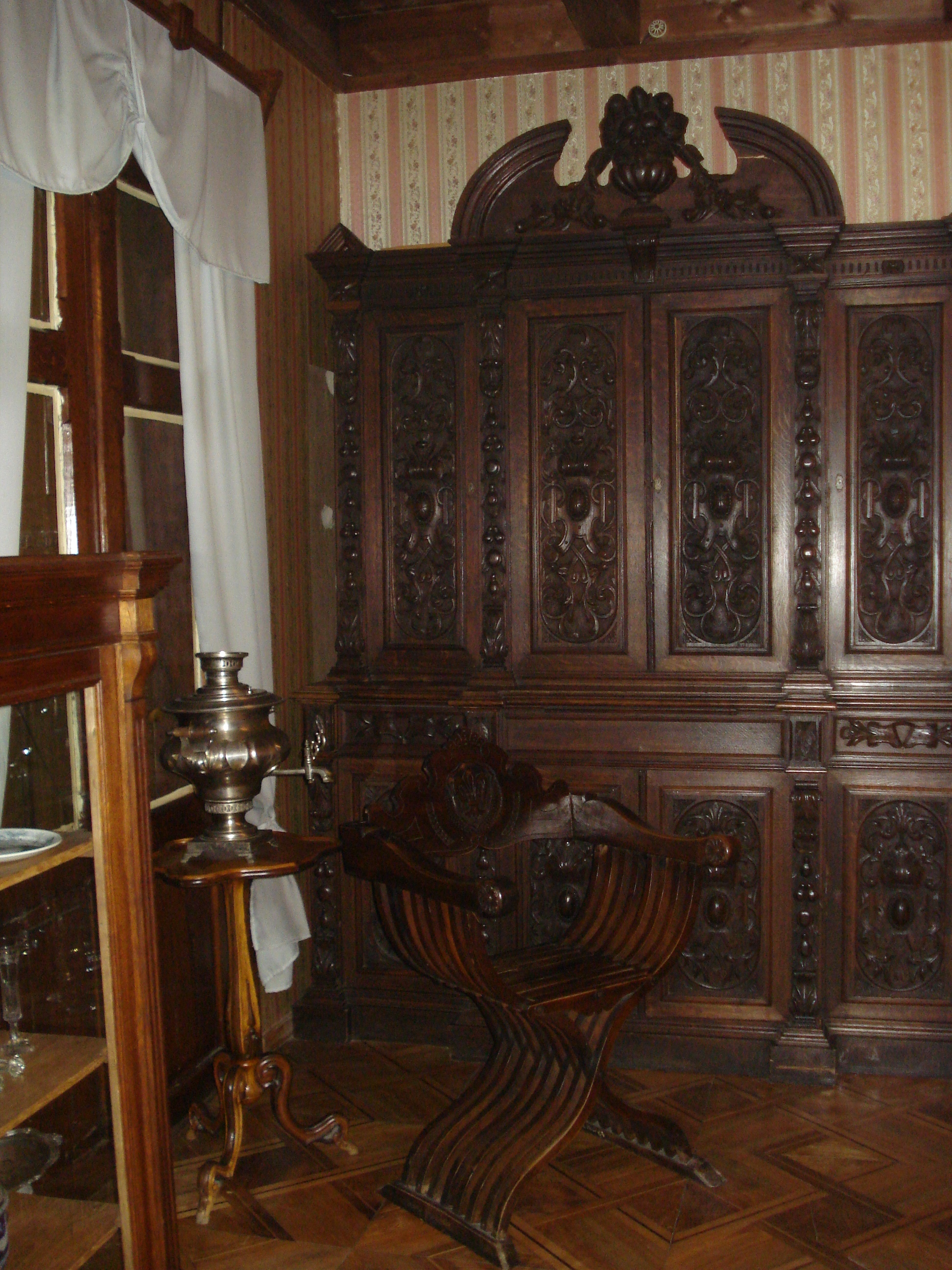 Dinning room. Alexander Pushkin Museum in Vilnius. Valgomasis (Literatūrinis Aleksandro Puškino muziejus. Subačiaus g. 124)